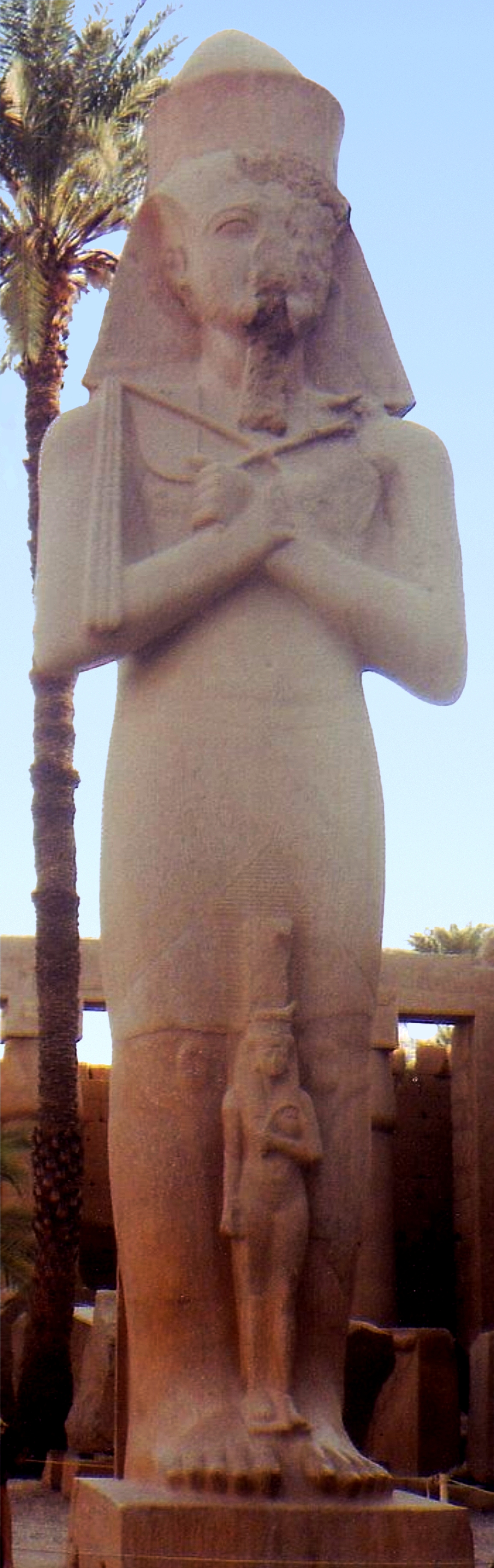 Tempio di Karnak Gran cortile, la statua in granito rosa di Ramses II